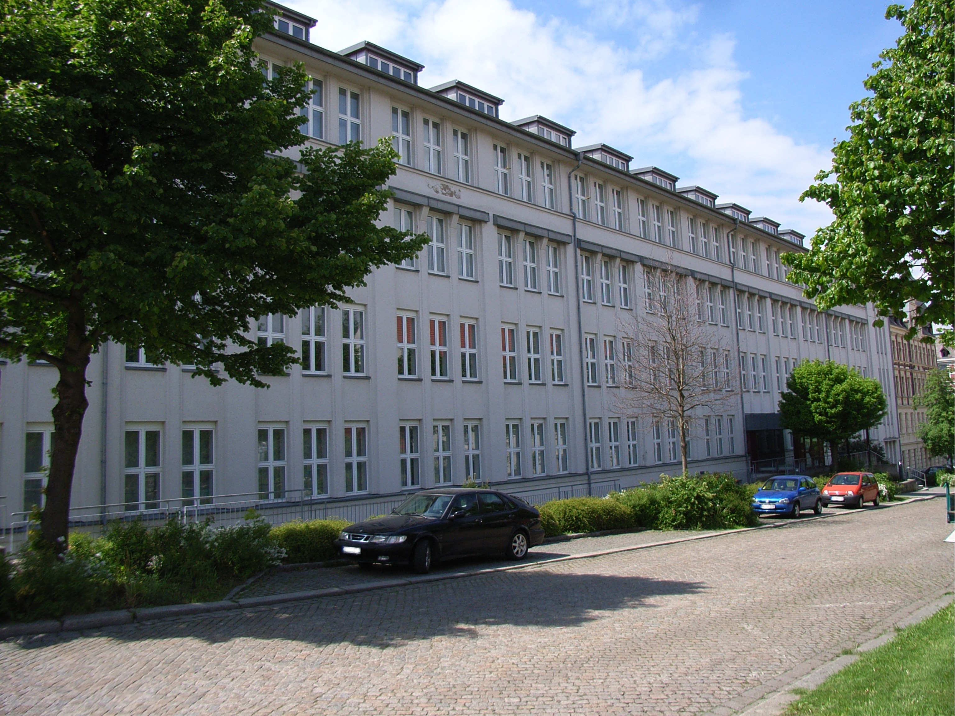 Ehemaliges Montagegebäude der Meyer-Optik in der Fichtestraße in der Görlitzer Südstadt